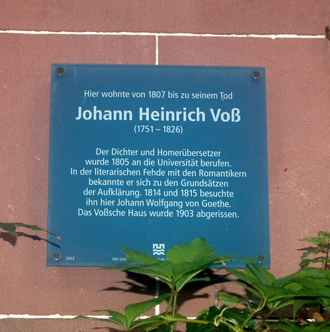 Friedrich Ebert Grundschule und Gedenktafel Johann Heinrich Voß